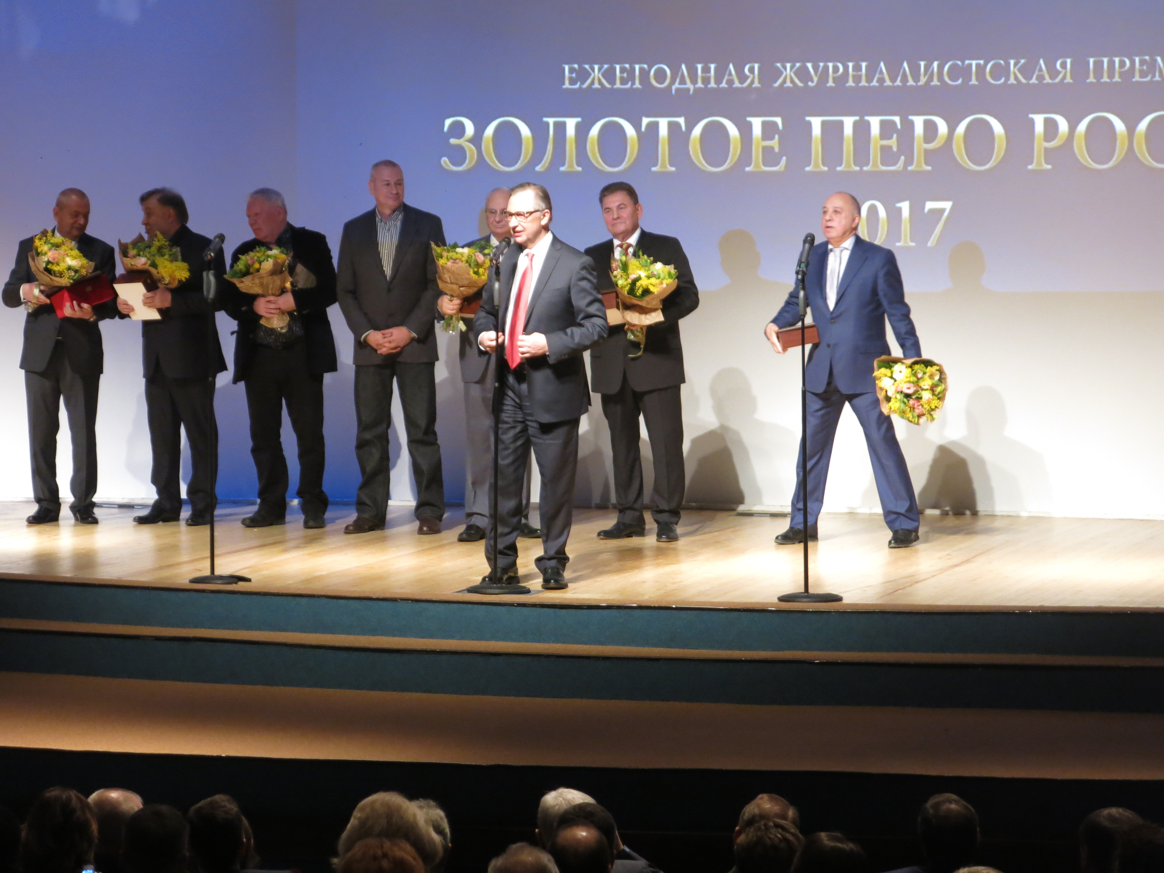 Награждение Николая Зятькова премией «За верность профессии» от Союза журналистов России в рамках ежегодной церемонии "Золотое Перо России"